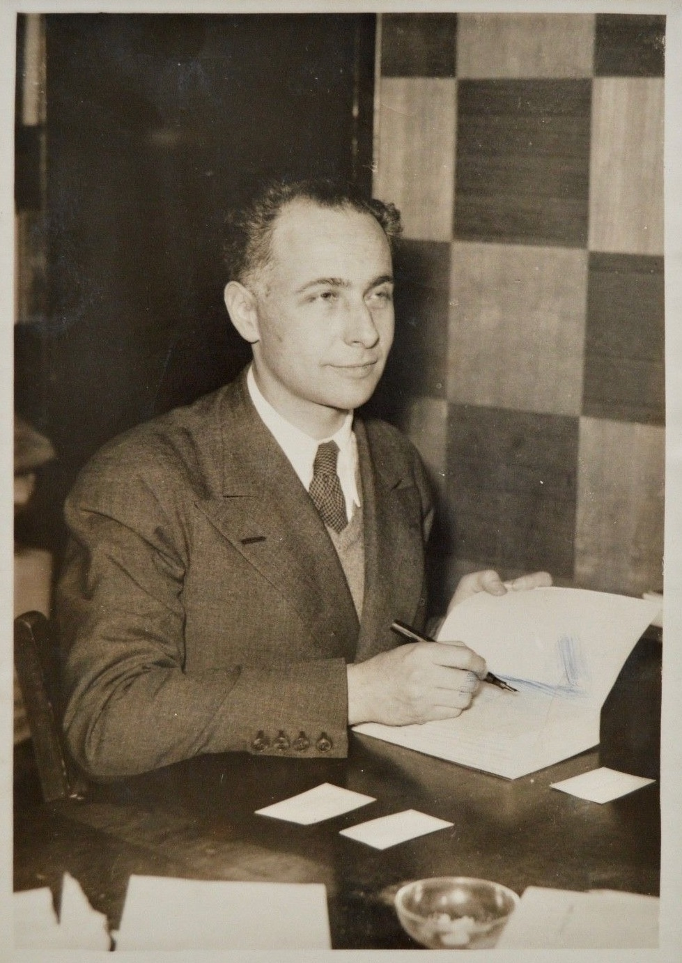 Louis Aragon. Photographie prise pour l'attribution du prix Renaudot au roman Les Beaux Quartiers le 9 décembre 1936.